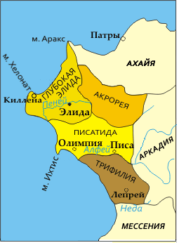 Русификация карты